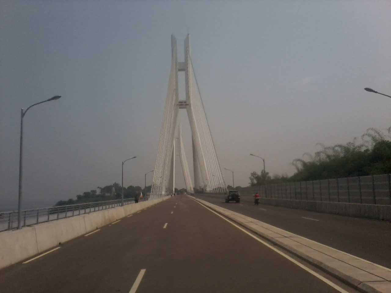 Corniche sud de Brazzaville au bord du fleuve